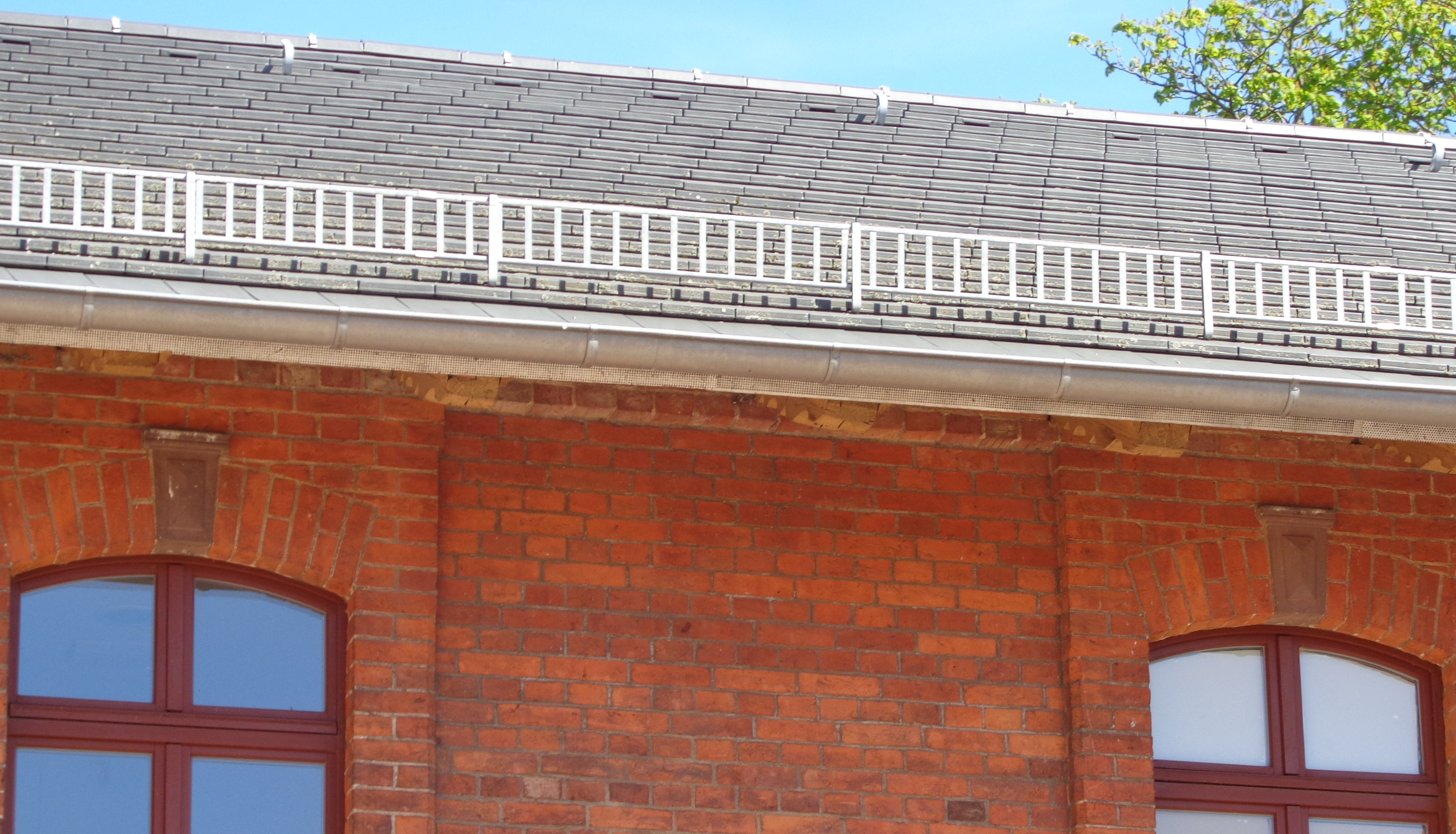 Schneefangsystem im Kloster Dobbertin